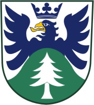 Orlické Záhoří /okres Rychnov nad Kněžnou/